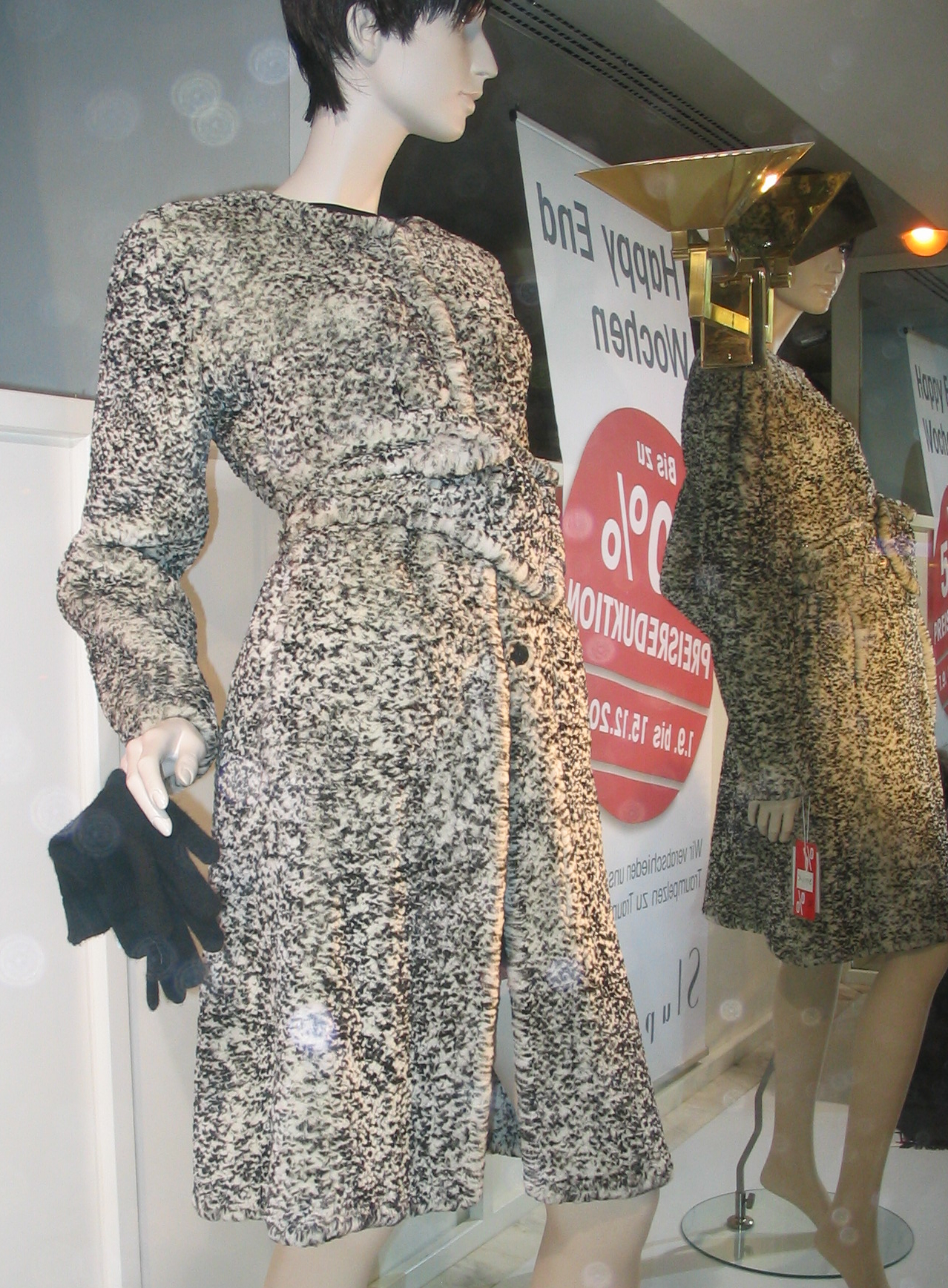 Samtnerzmantel, gewebt. Gesehen bei Slupinski, Königsallee, Düsseldorf.